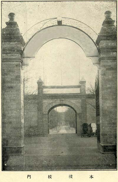 1920年代，北京交通大学校门